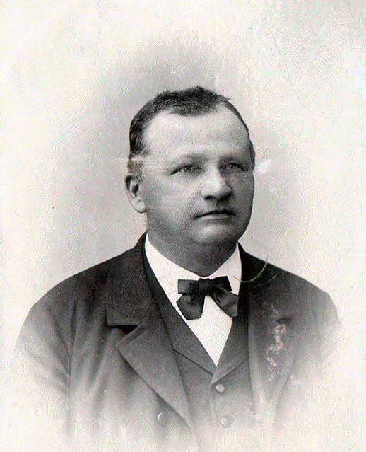 Adama Macura ur. 1848 polski nauczyciel